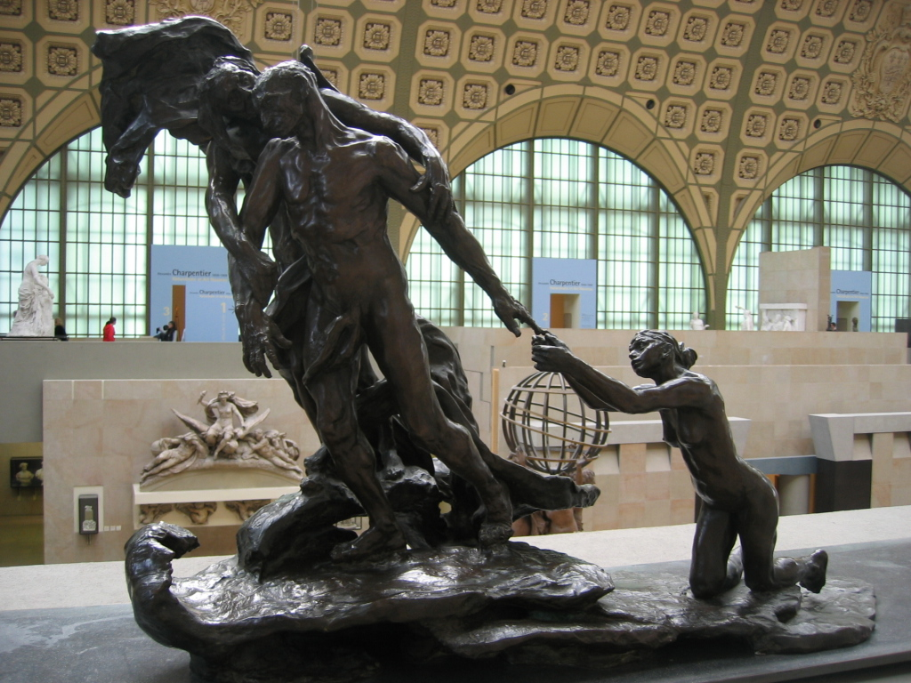 L'age mûr, statue de Camille Claudel, Musée d'Orsay, Paris